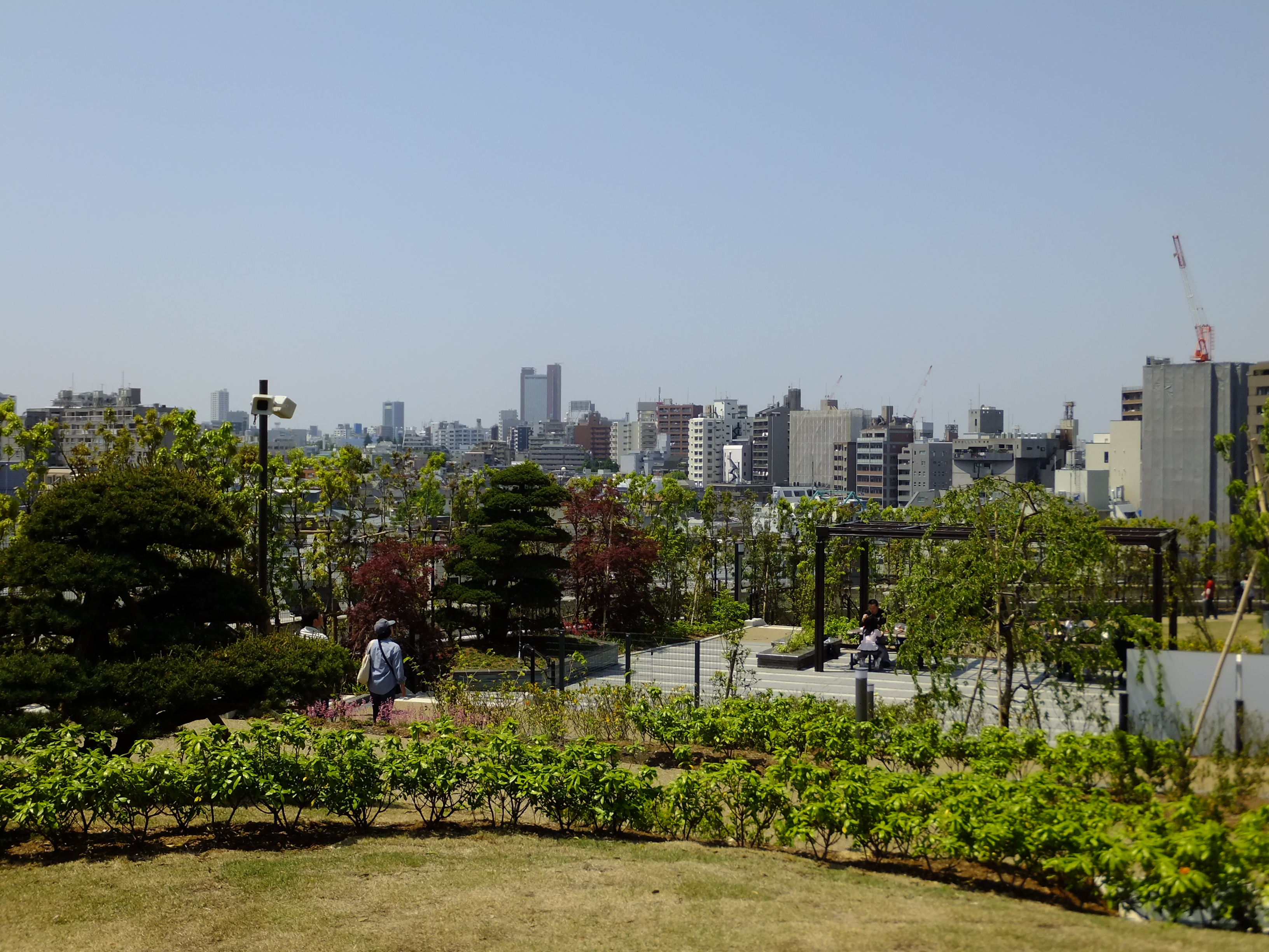 目黒天空庭園。三軒茶屋方向、快晴の日はこの方角に富士山が見える。